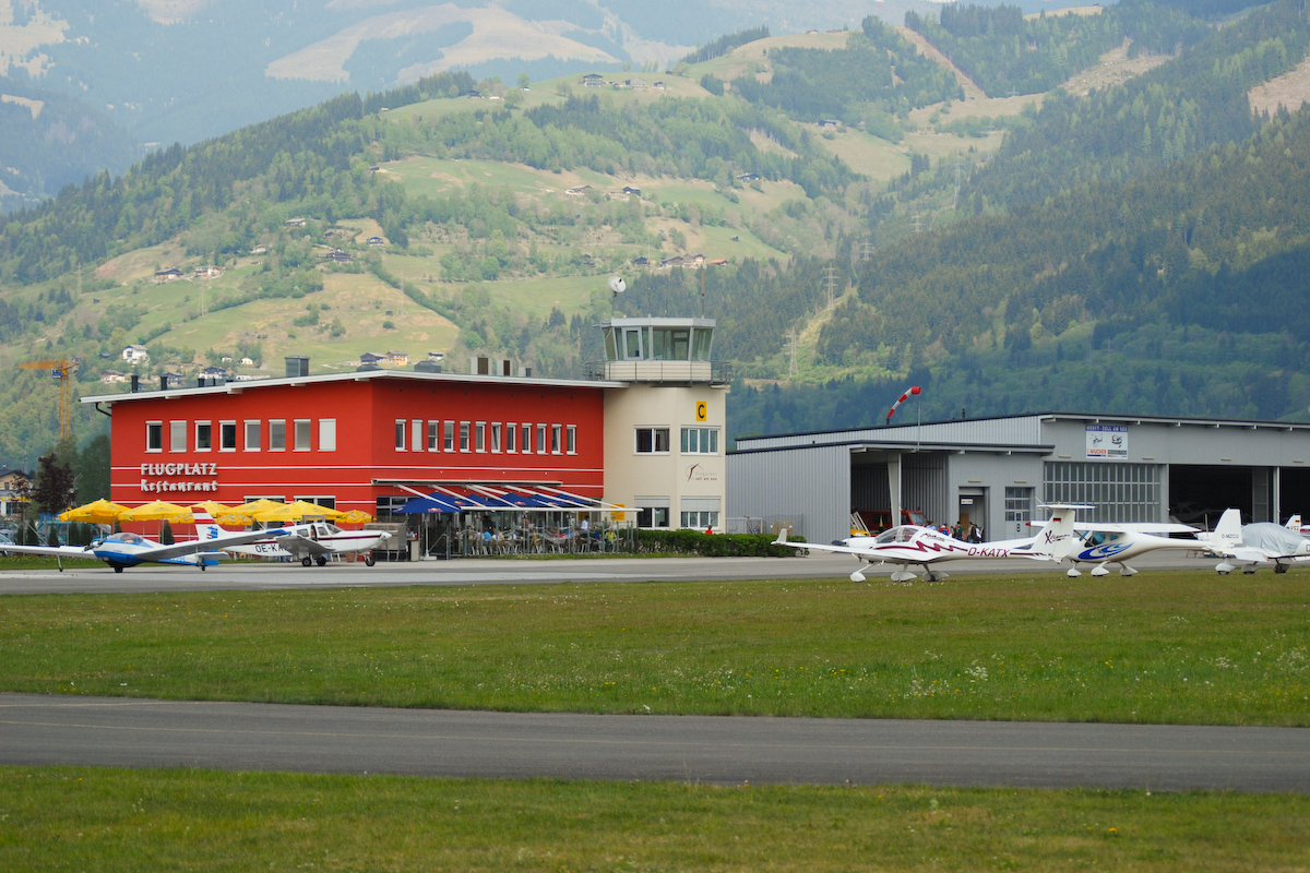 Flugplatz Zell am See von der Bundesstraße aus fotografiert